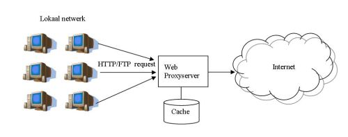 Hier een voorbeeld van een webproxyserver in aktie. De clients in het lokale netwerk sturen al hun HTTP/FTP requests (surfen en/of downloaden op internet) via de proxy naar het internet, en via deze proxyserver wordt het resultaat teruggestuurd naar de clients. Een van de voordelen van een webproxy is de snelheidswinst, immers een reeds opgehaalde pagina of bestand blijft in de cache van de proxyserver staan, zodat dit veel sneller beschikbaar komt voor een andere client in het netwerk. Vooral voor pagina's uit populaire sites biedt het gebruik van een webproxy dus voordelen. Weinig bezochte pagina's moeten toch opgevraagd worden en kunnen niet uit de cache komen. Proxy servers laten ook toe om een verbinding te maken tussen een intranet en het internet. zelfgemaakte tekening